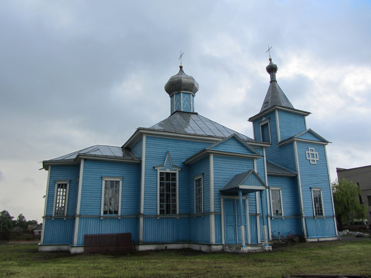 Стахава. Царква Покрыва Прасвятой Багародзіцы